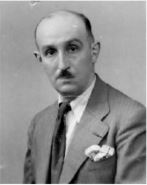 Photographie noir et blanc d'Albert Henri Curvale. Photographie prise après guerre (années 50 ?)